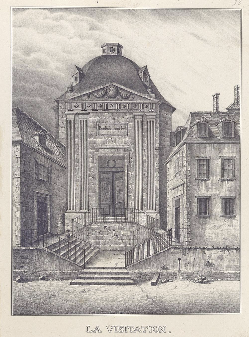 Vue de la chapelle de la Visitation (Limoges, Haute-Vienne, France).